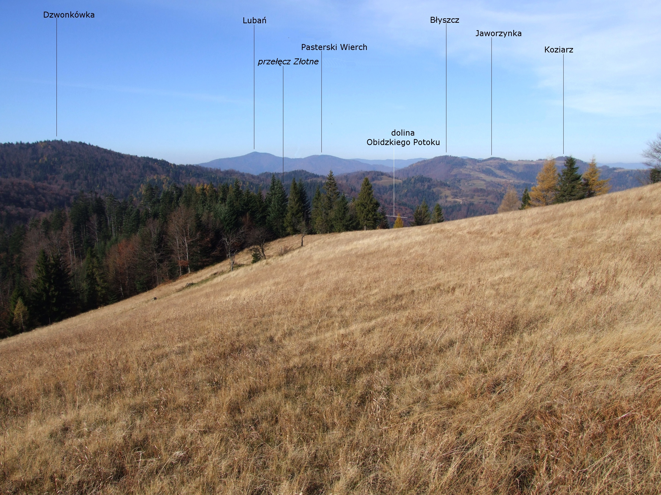 Widok z Rokity (Pasmo Radziejowej)